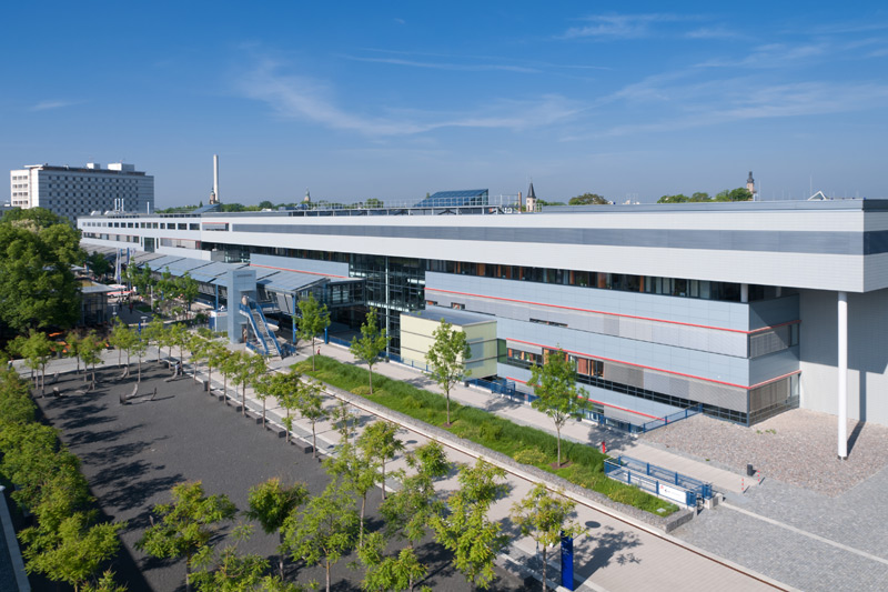 Universitätsklinikum Erlangen: Internistisches Zentrum (INZ) Außenansicht